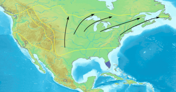 Wanderung und Verbreitung des Monarchfalters (Danaus plexippus) in Nordamerika (Animation)